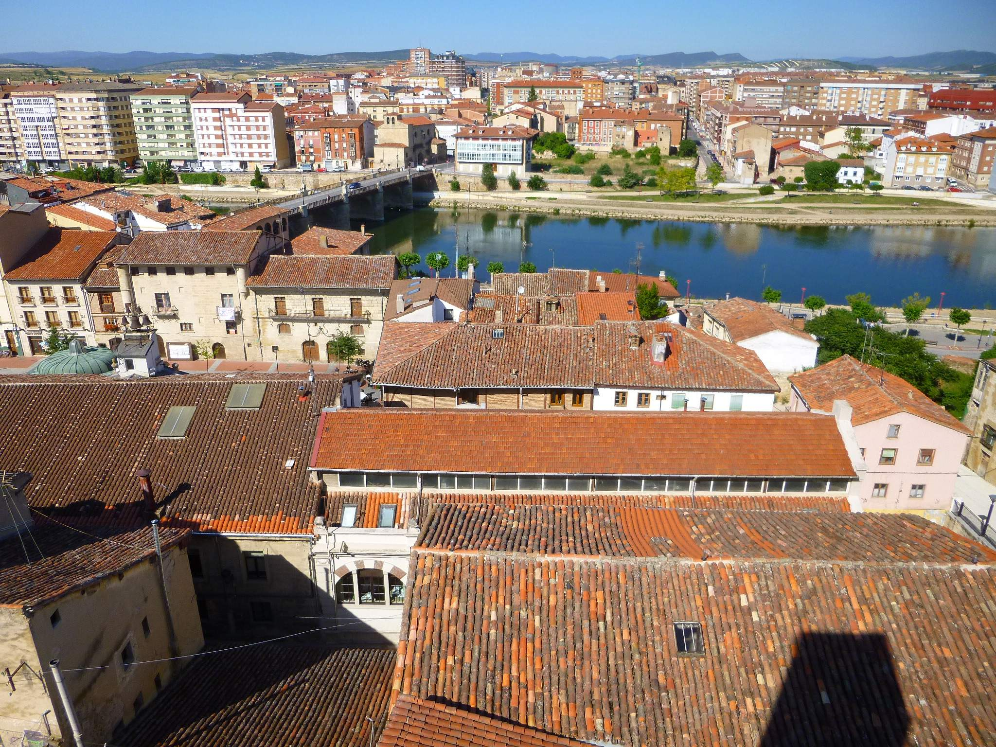 Panorámica urbana de Miranda de Ebro desde el Castillo